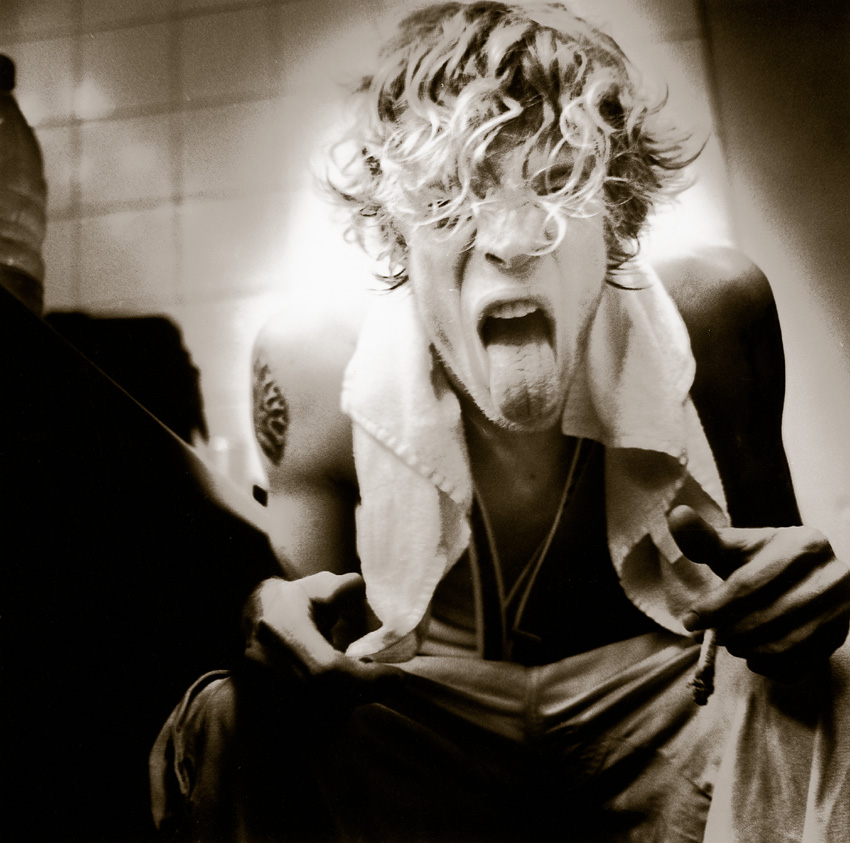 Ferris Mc in München backstage